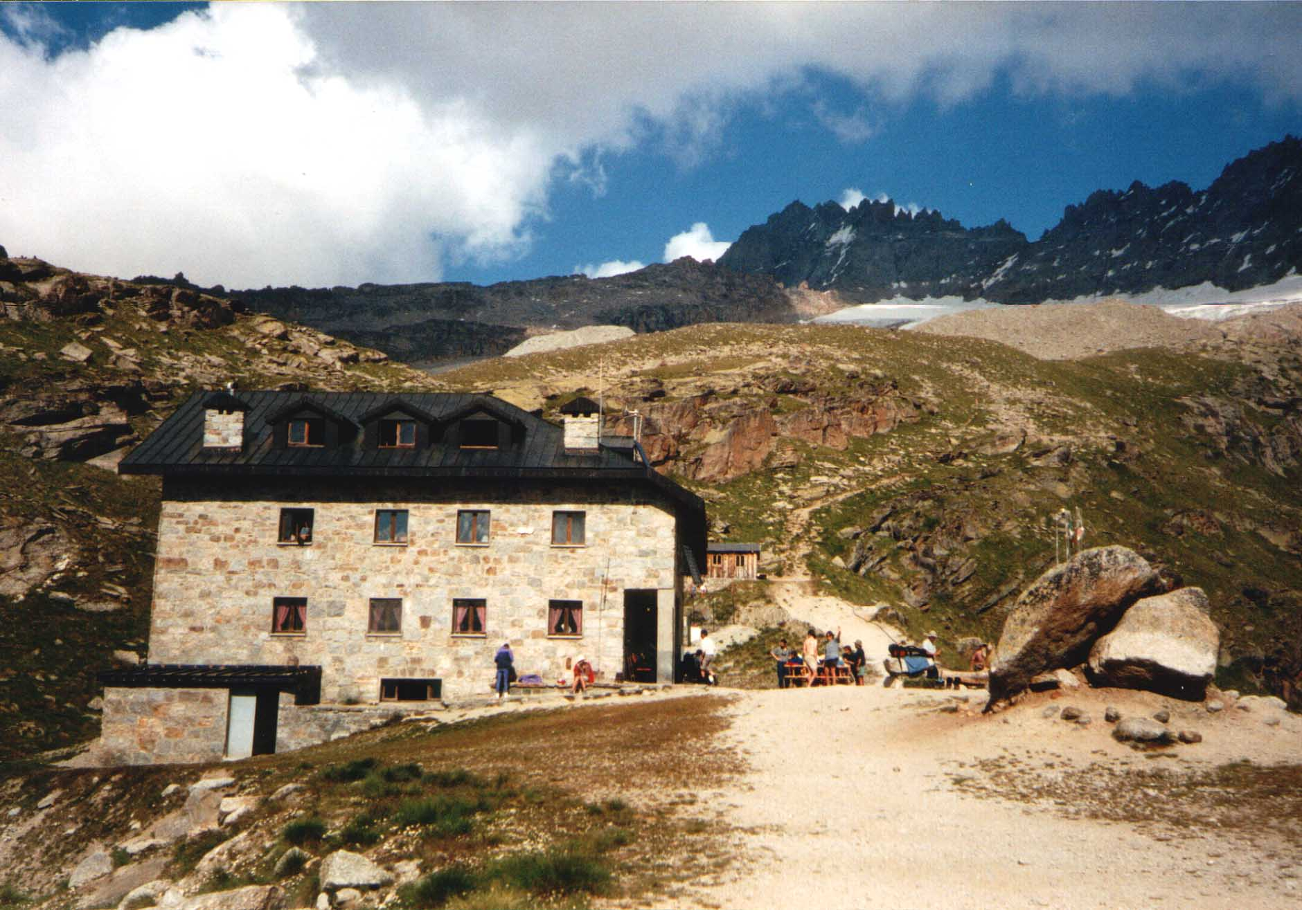 Rifugio Chabod am Gran Paradiso Selbst fotografiert am 28. Juli 2002